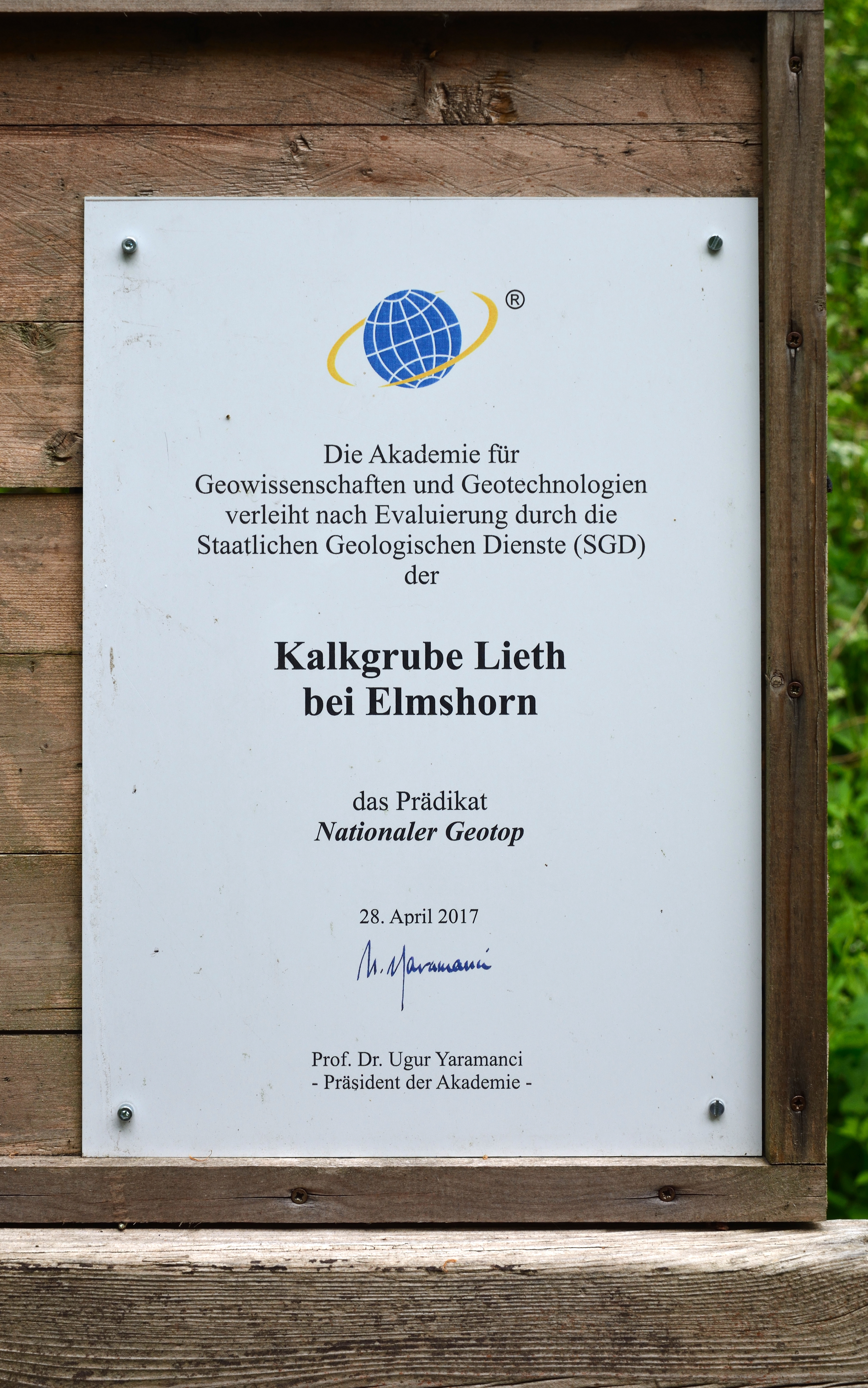 Das Nationale Geotop "Liether Kalkgrube" im Mai 2020.